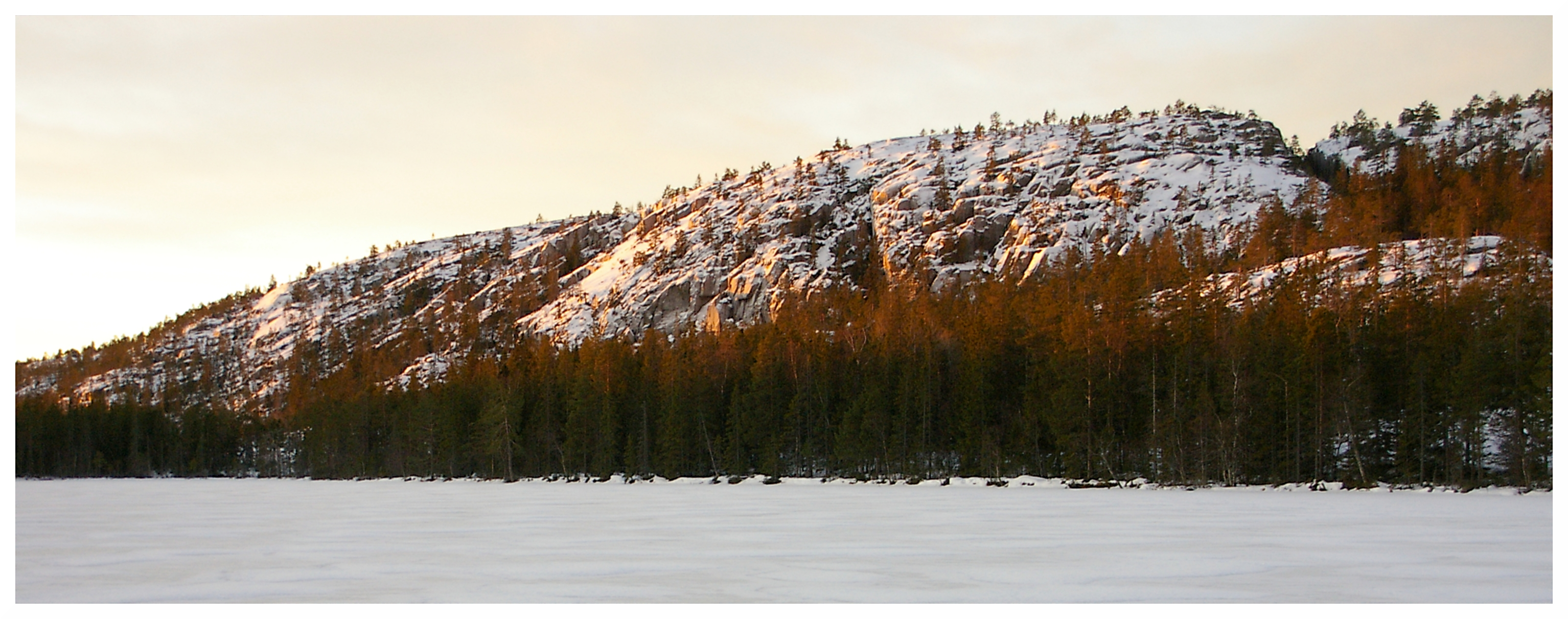 Blick auf den Slåttdalsberget